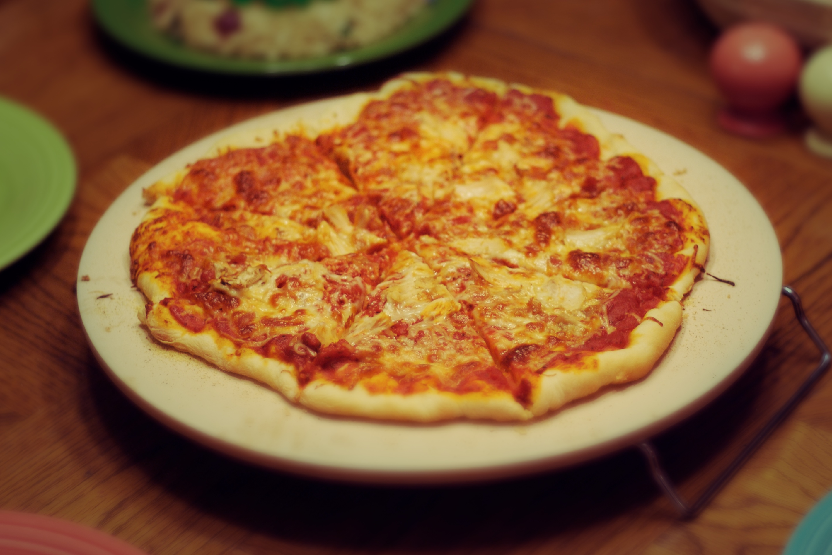 Pizza on a pizza stone